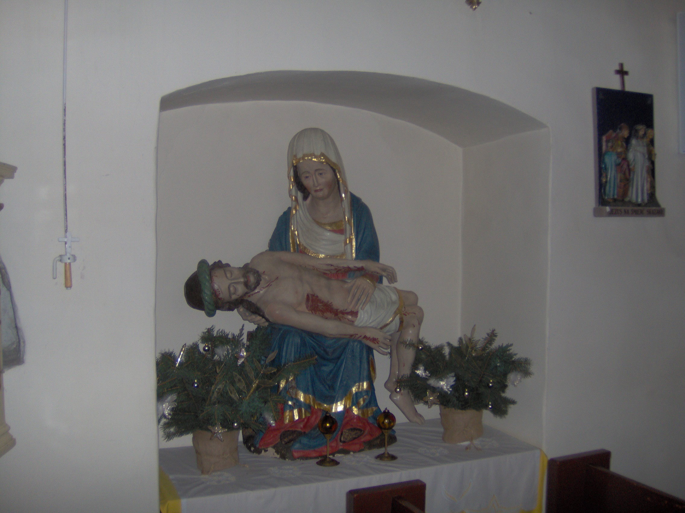 Pieta in church in Kijewo Królewskie